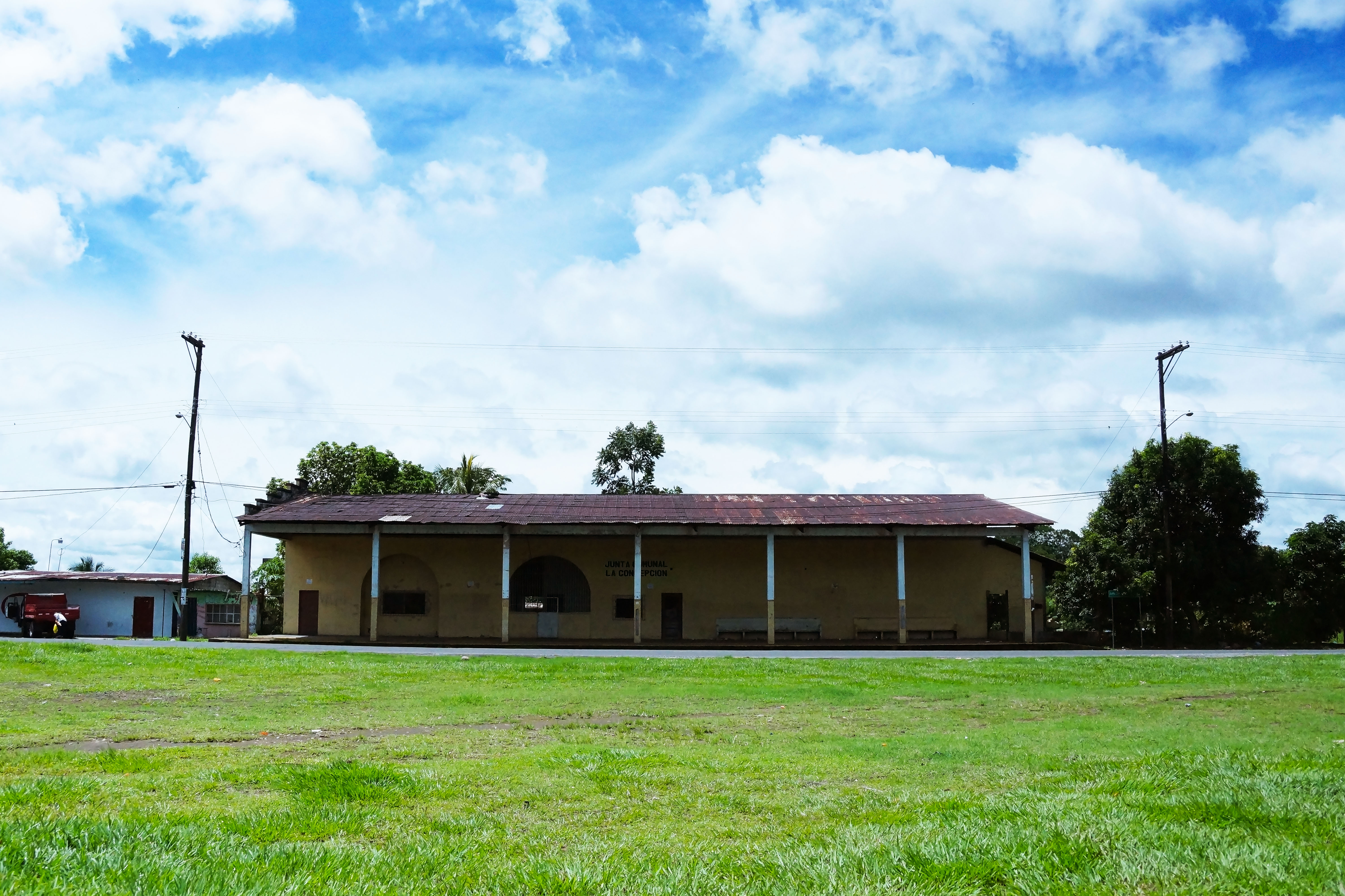 Mediante Ley 44 de 2000 se declaró monumento histórico nacional al edificio que albergó la Estación del Ferrocarril y las áreas colindantes ubicadas en Calle tercera y cuarta Oeste, frente a la Plaza del Ferrocarril.42 La Estación Central estaba ubicada en el edificio que hoy, alberga a la Biblioteca pública Santiago Anguizola Delgado; a un costado de la Gobernación de la Provincia. El 22 de abril de 1916, el presidente Belisario Porras inauguró oficialmente esta obra, cuya extensión fue de 92.517 kilómetros. “El costo de esta obra, según datos del Museo de Obaldía, fue de B/. 1, 670,000 e incluía: talleres, líneas telegráficas y teléfono, locomotoras y carros. Luis Máximo Miranda, profesor de Historia Universal, en la UNACHI, señaló que el pasaje que se cobró inicialmente, fue de un real de estación a estación. Por supuesto, la primera clase pagaba el doble. Como es lógico, años después los costos operativos subieron y se hizo necesaria la figura del colector o encargado de cobrar las tarifas.